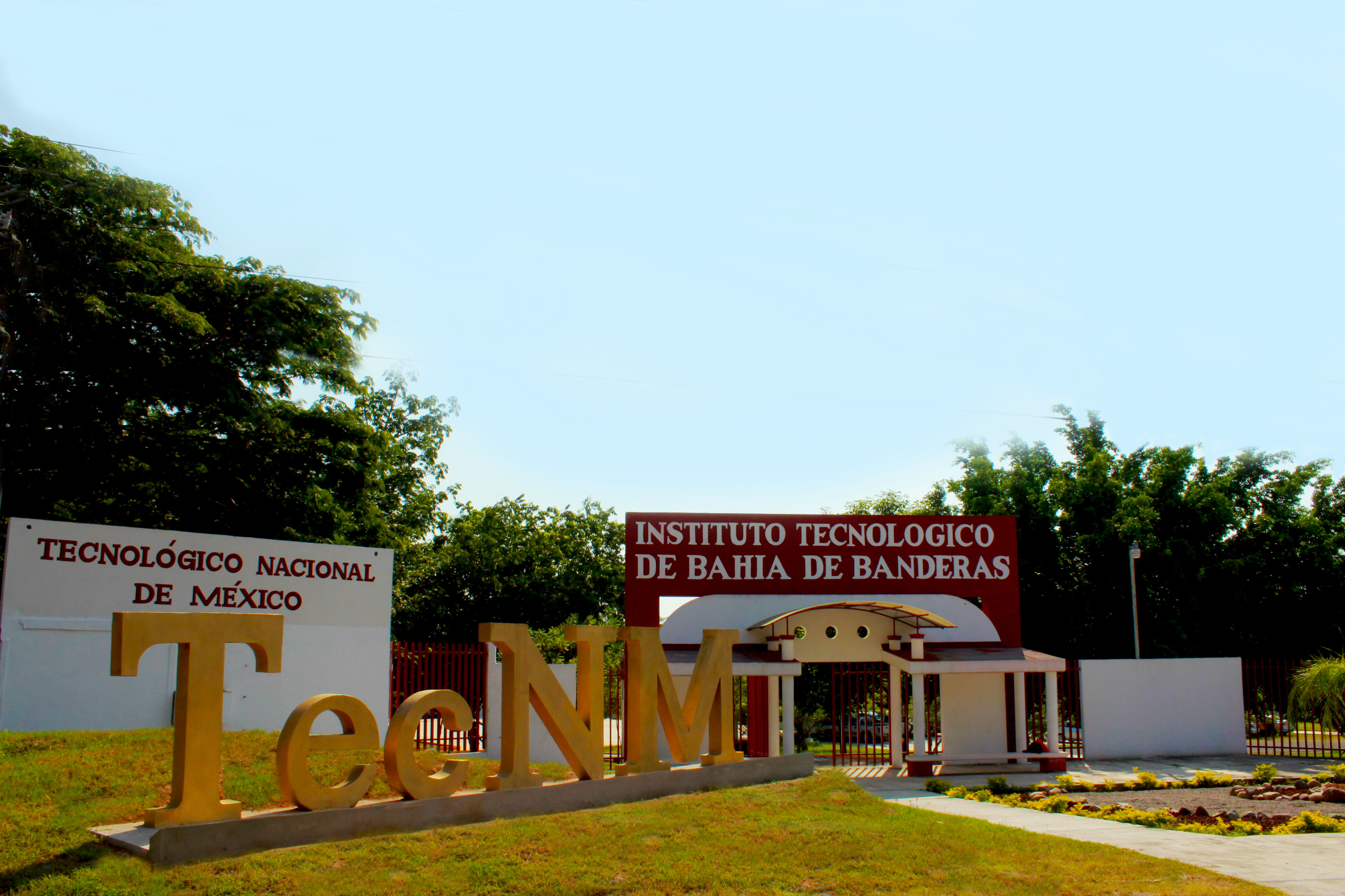 En el acceso principal del Tec Bahía se observan las letras #TecNM, institución a la que con orgullo pertenecemos.